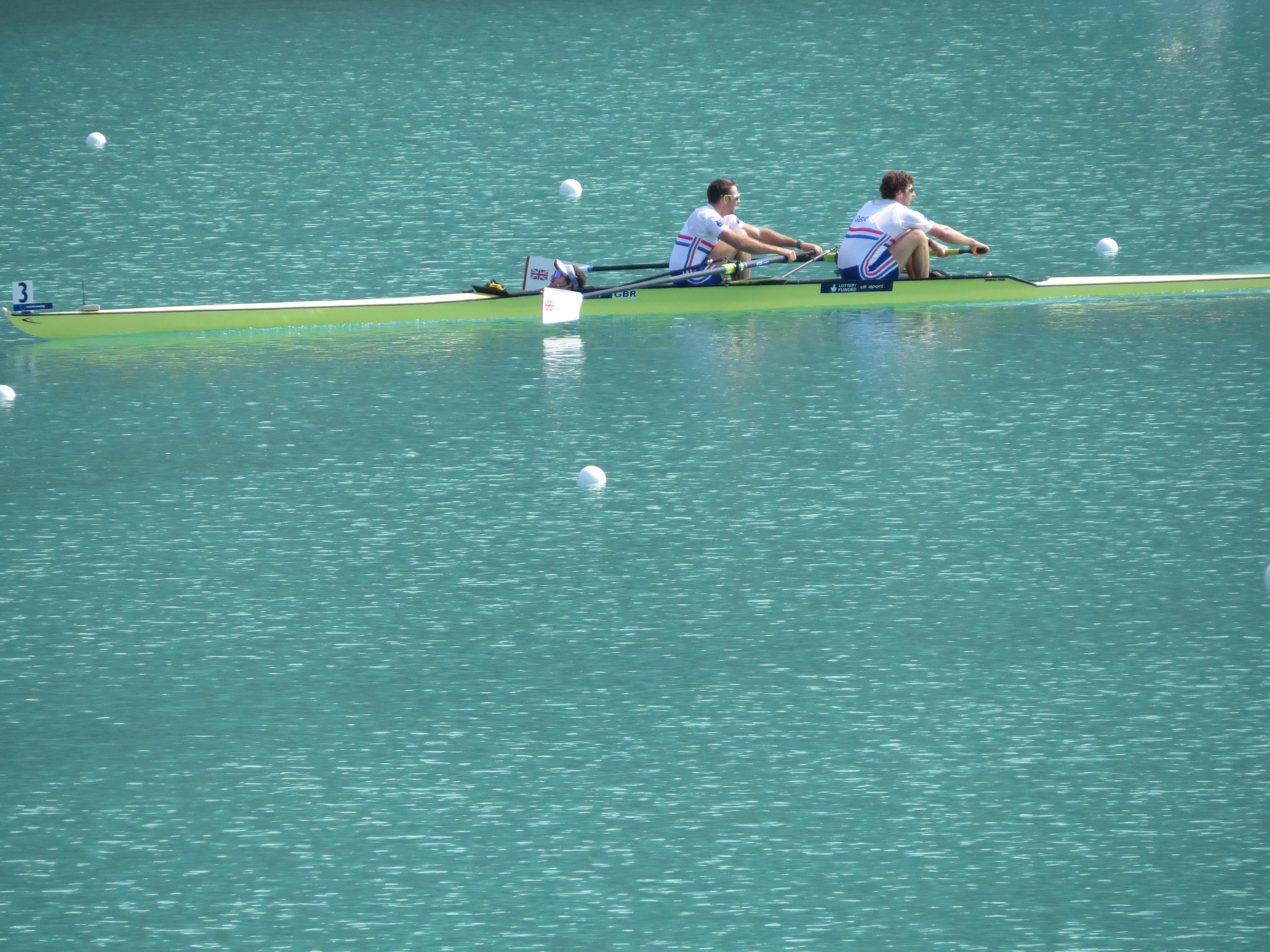 Bateau en finale du M2+ GBR : REILLY-O'DONNELL, Nathaniel, TARRANT, Matthew, FIELDMAN, Henry